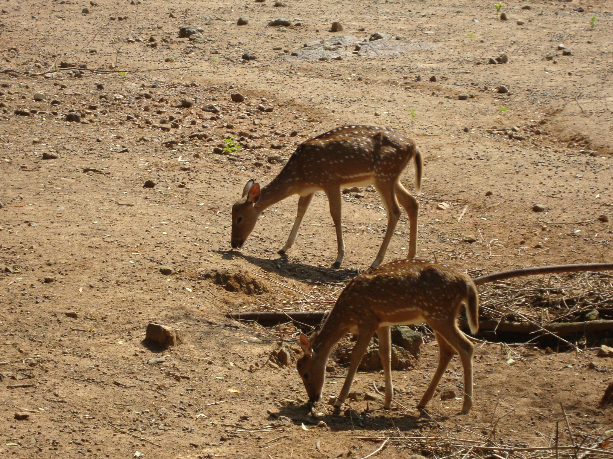 Spotted Deer in Vandaloor Zoo, Chennai.